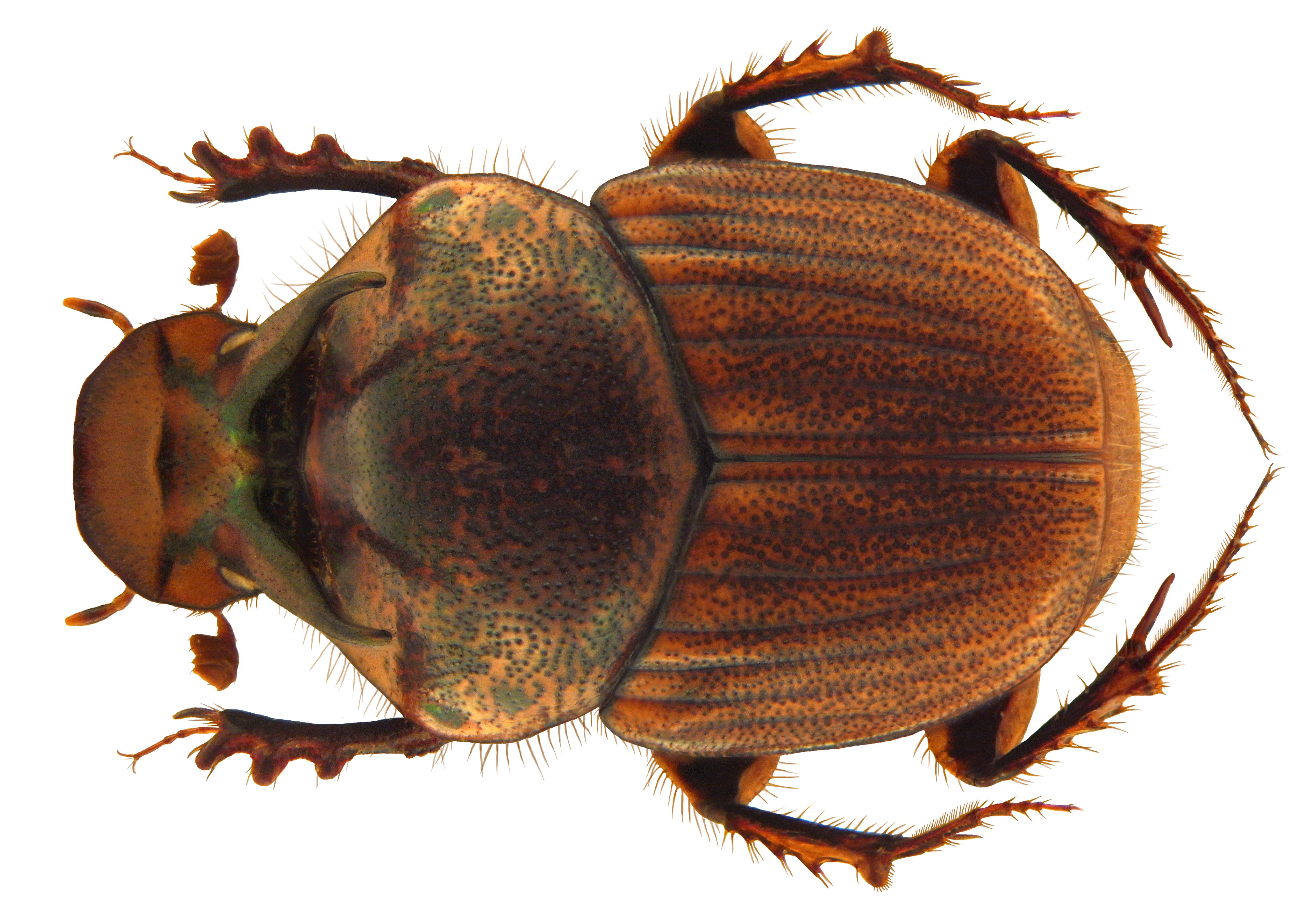 Familie: Scarabaeidae Groesse: 10,0 mm Fundort: Thailand, Chom Thong leg. J.Farkac, 1991; det. J.Scheuern, 1993 Photo: U.Schmidt, 2010